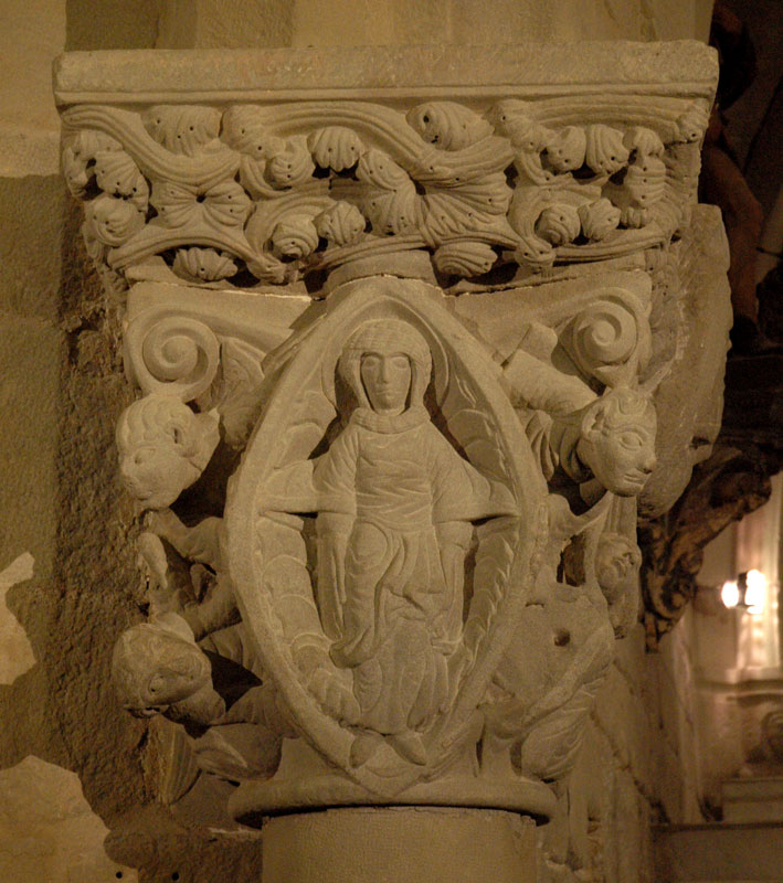 Mestre de Cabestany. Capitell de l’Assumpció. Església de Rius de Menerbés (Rieux-Minervois), Llenguadoc-Rosselló, França